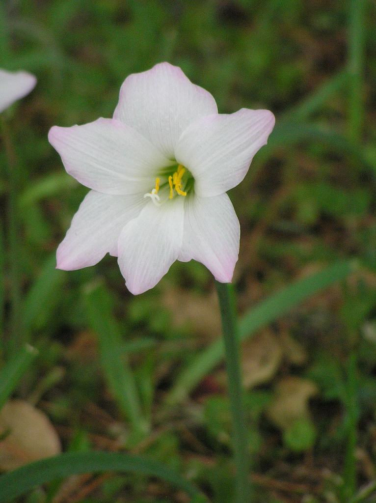 rain lily